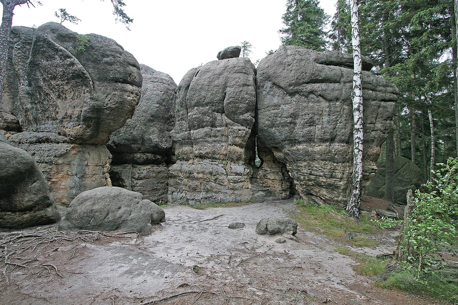 Radkovské skály - skály u vyhlídky Baszta 663 m